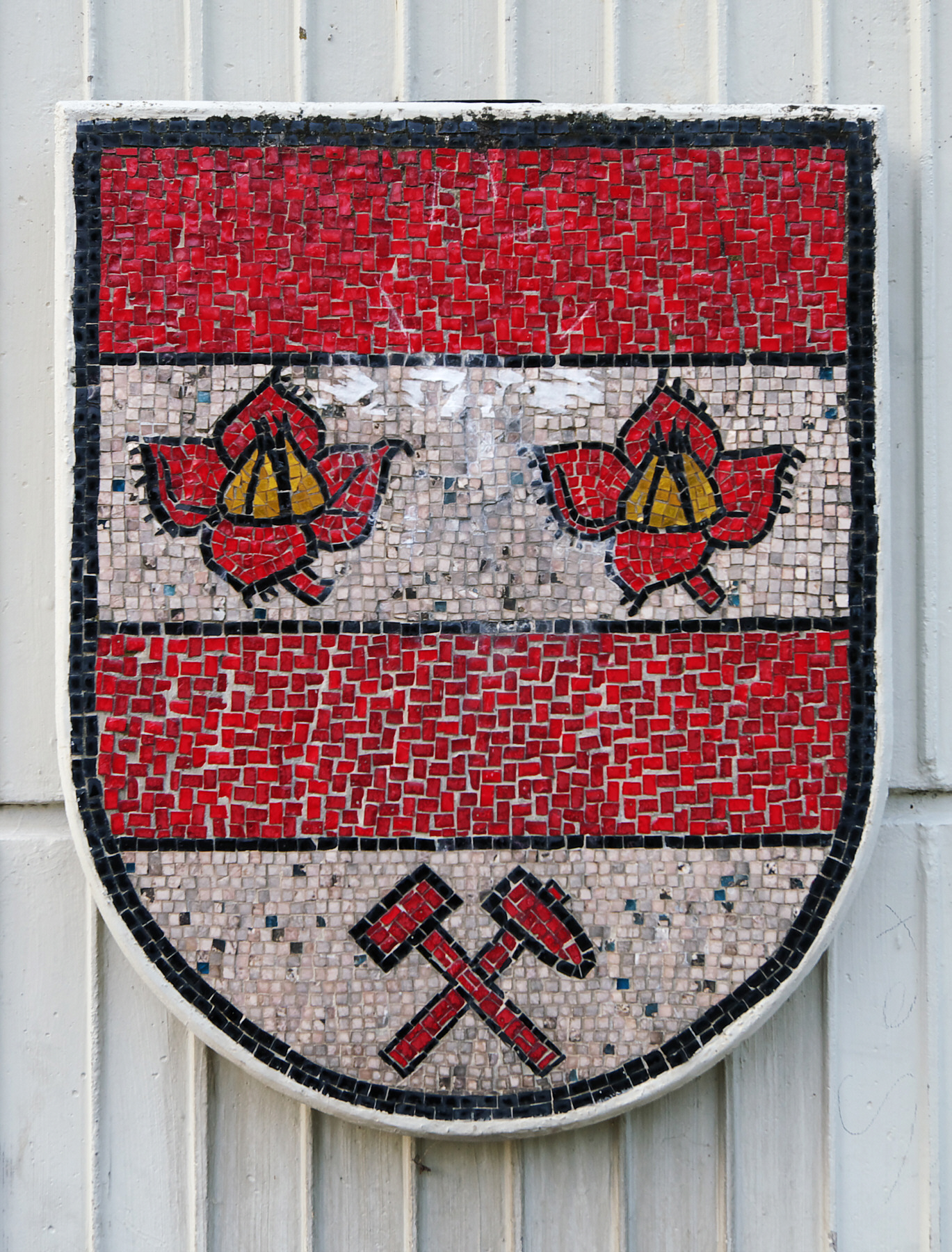 Hamm: Wappen der ehemaligen Stadt Bockum-Hövel am heutigen Bezirks- und Bürgeramt, dem vormaligen Rathaus in Bockum-Hövel